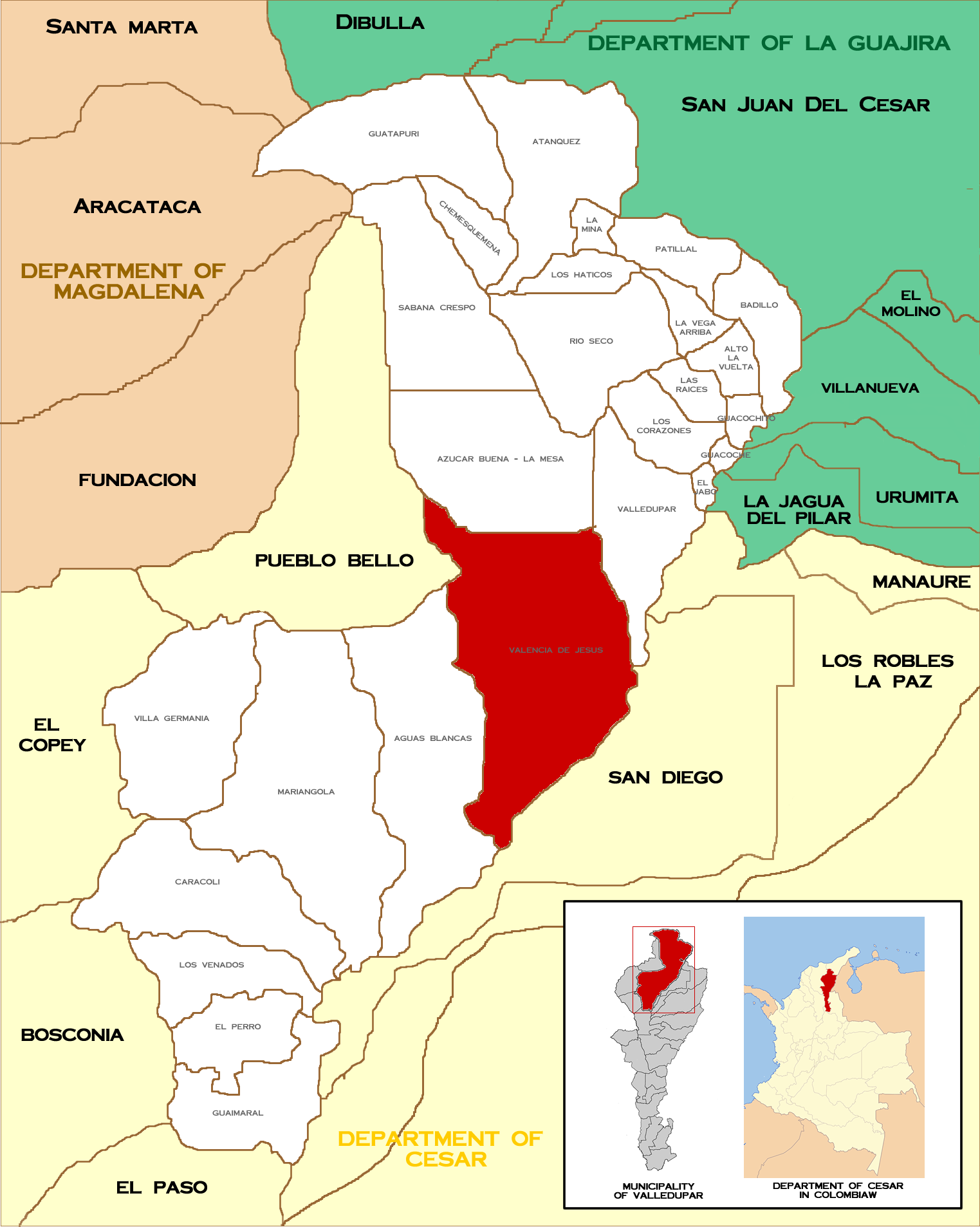 Map of Corregimientos of Valledupar, Valencia de Jesus